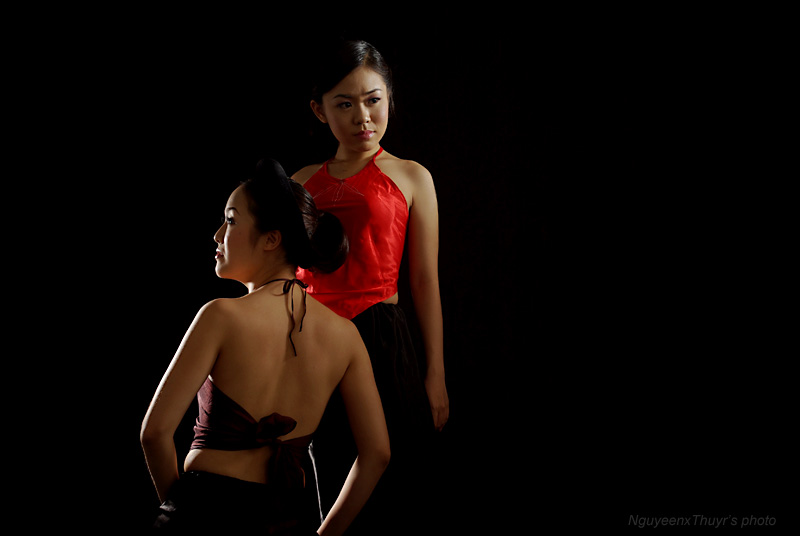 Yếm by NguyeenxThuyr